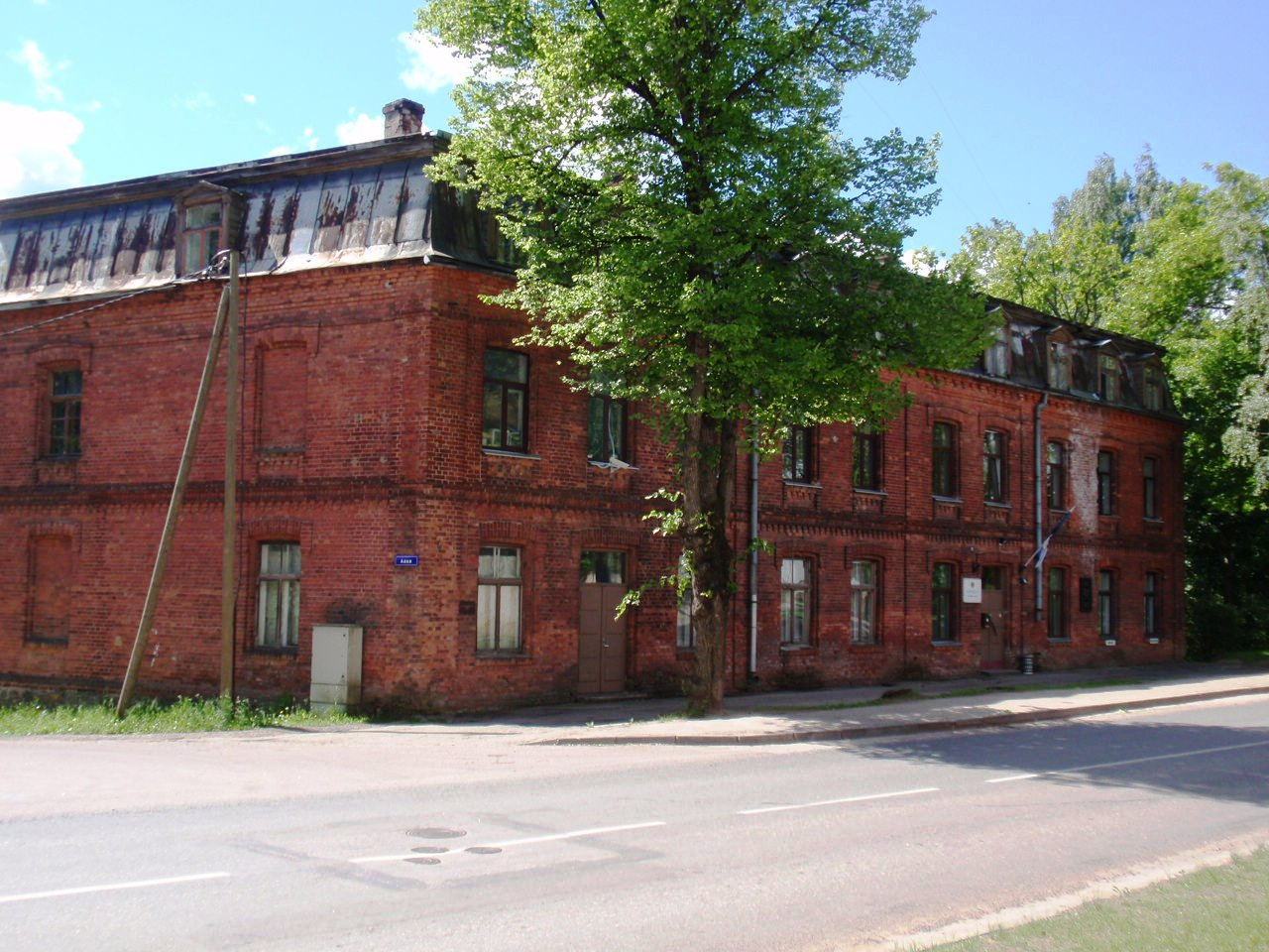 Kaitseliidu Valgamaa maleva staabihoone aadressil Võru tn. 12, Valga.